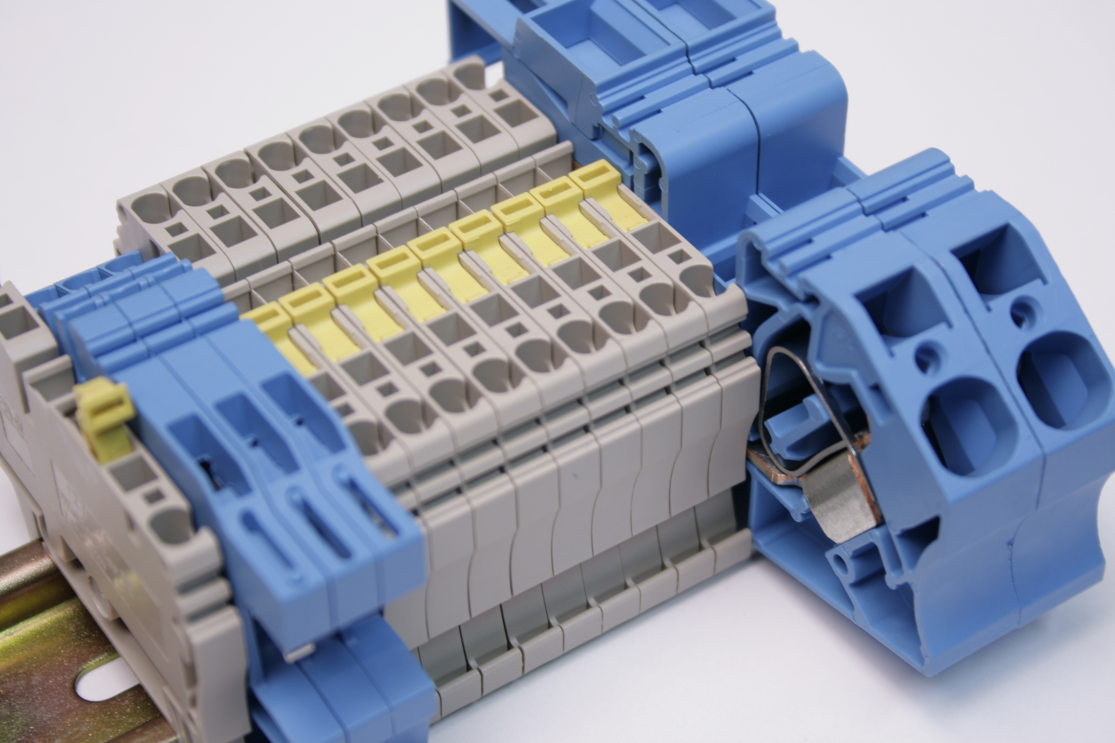 Reihenklemmen auf Hutschine